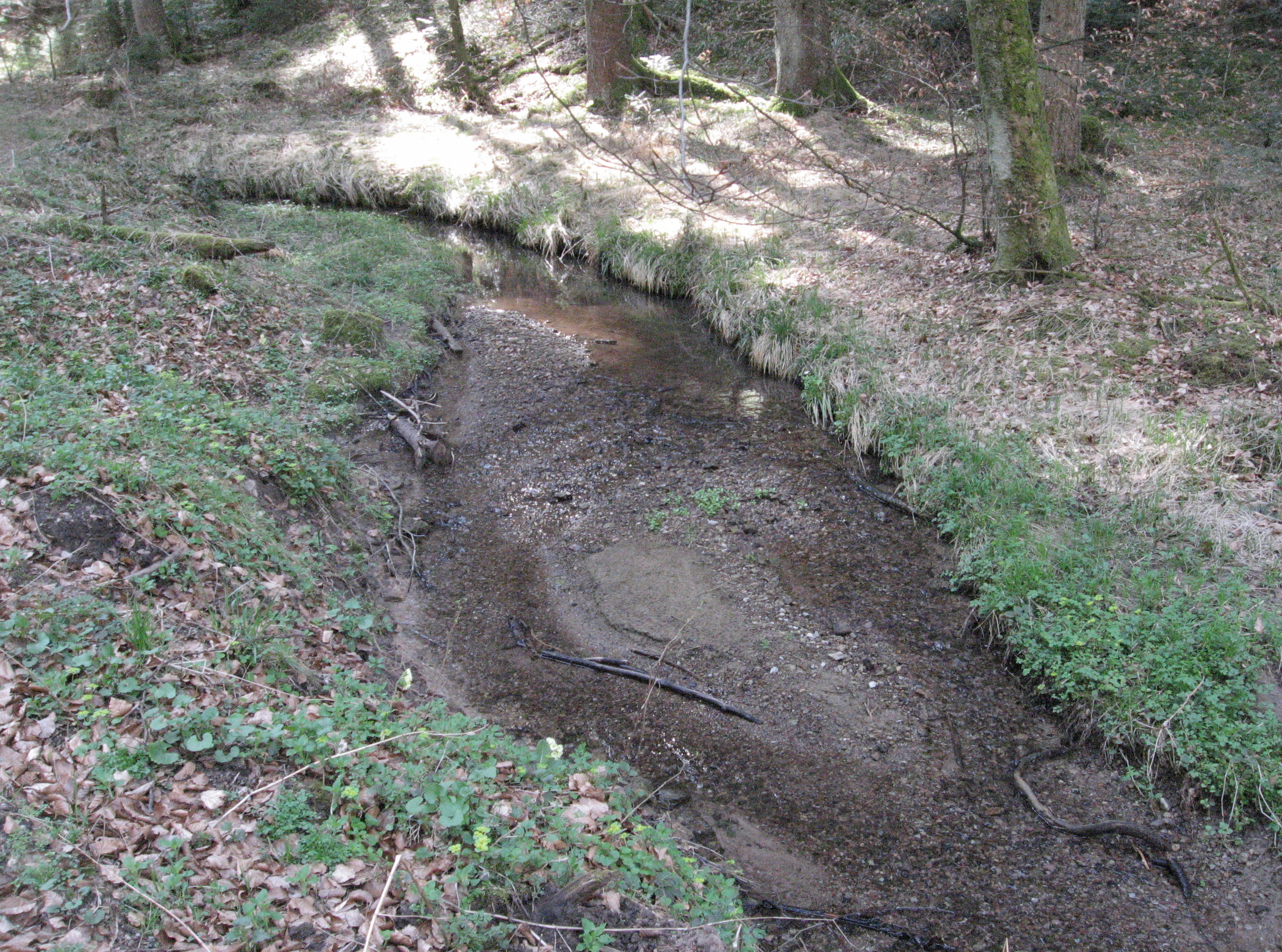 Der Bach durch die Hahnenbergklinge, die an der Bühlerzeller Hambachsägmühle von rechts und Süden in den Hambach mündet. Der Bach durch die Hahnenbergklinge ist Grenzlinie zwischen den Gemeinden Bühlerzell (orographisch und im Bild rechts) und Sulzbach-Laufen (links).